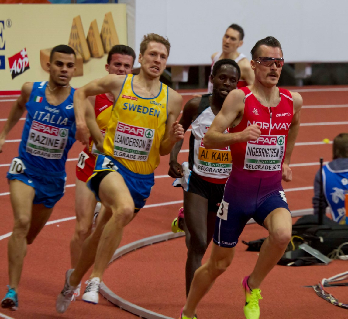 _300 kwal 3000m man ingebrigtsen